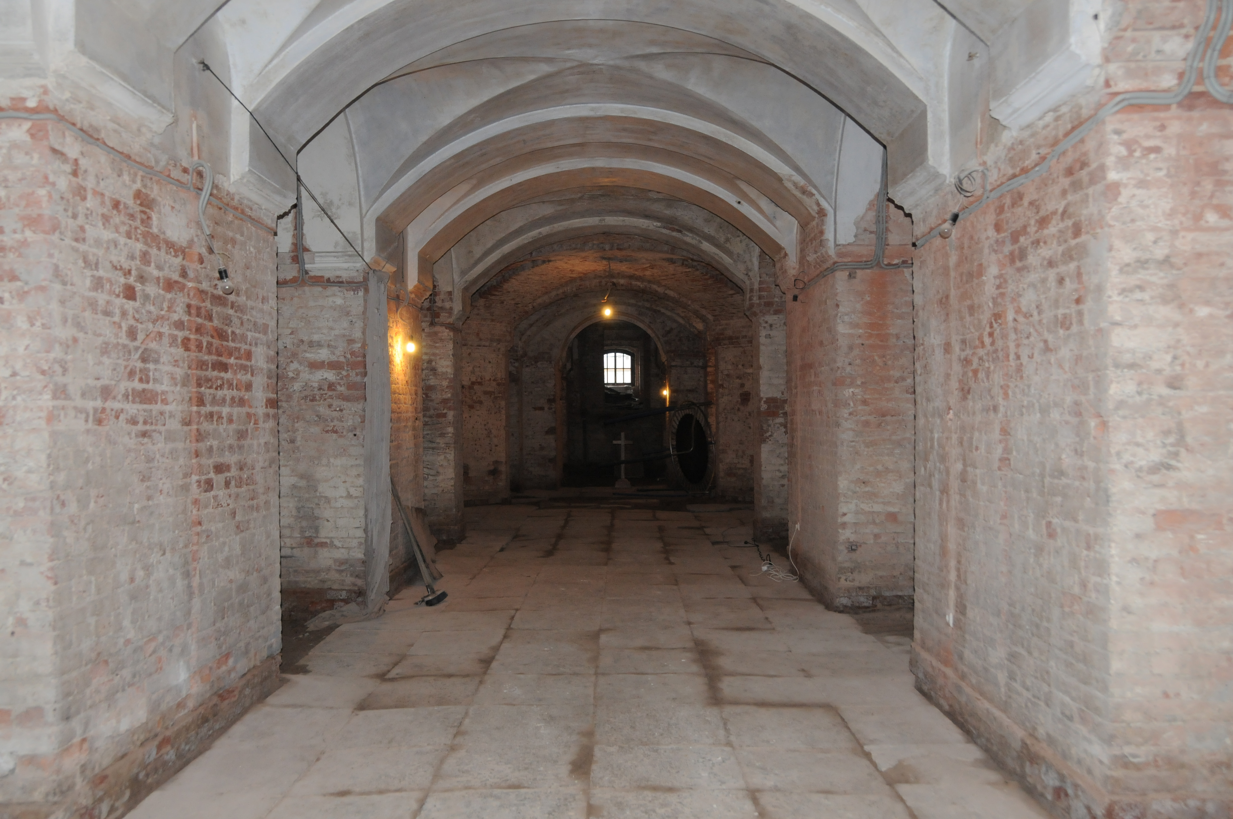 Крипта Храма Посещения Пресвятой Девой Марией Елизаветы (Санкт-Петербург)